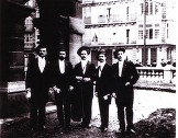 Le premier bureau de l'UNAGEF élu en mai 1907, de gauche à droite : Lorentz, trésorier, Nancy, Salsedo, Vice-Président, Bordeaux, Debrulle, Président, Lille, Chaumont, Vice-Président, Dijon, Gosselin, Secrétaire, Caen. Ils portent tous la faluche.